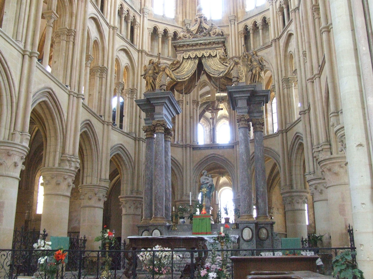 Eglise Notre-Dame de Mouzon, Mouzon, Ardennes, France